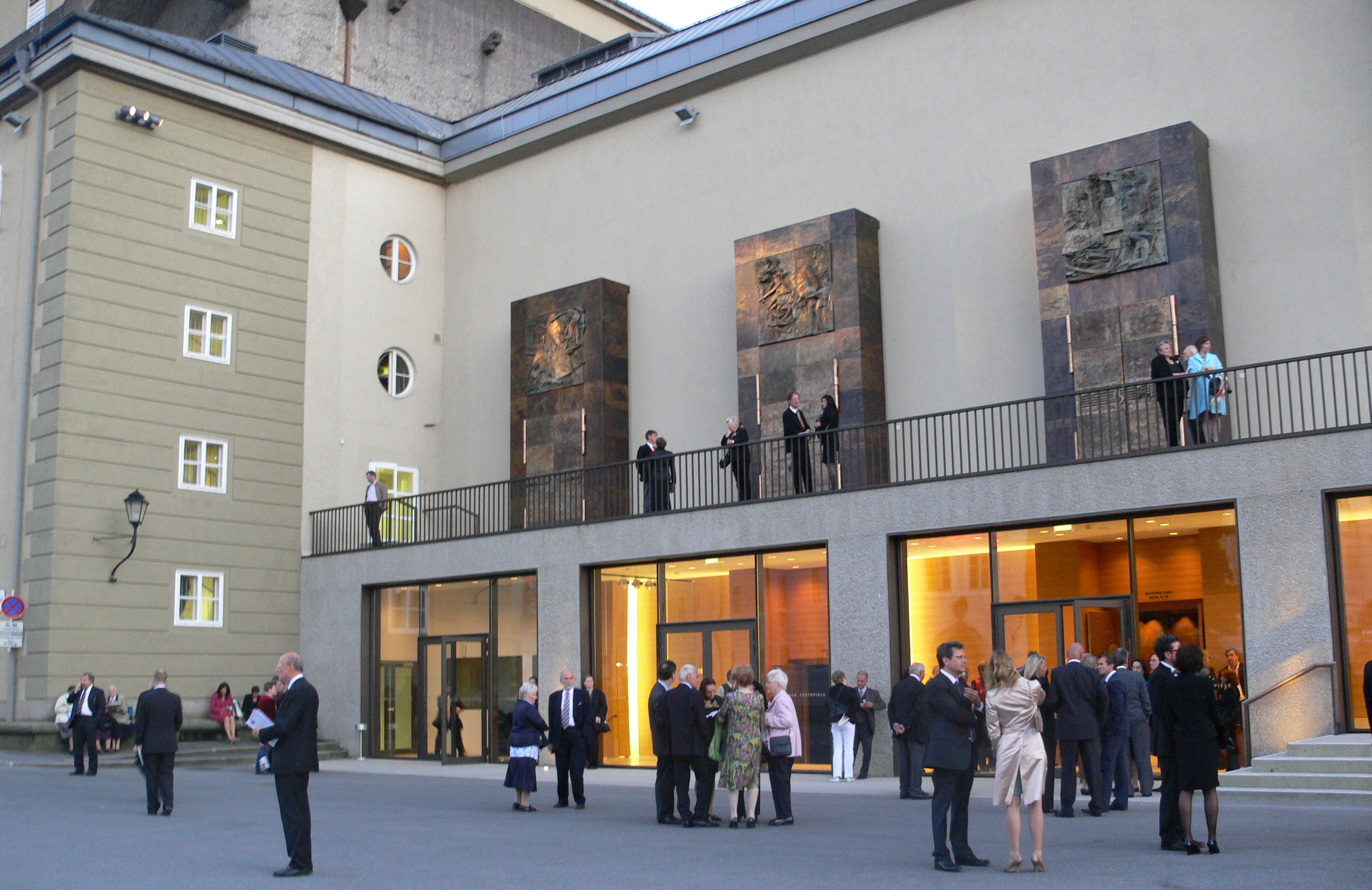 Salzburg, Festspielhauskomplex, Haus für Mozart (Kleines Festspielhaus) Eingangsportale mit Reliefs von Josef Zenzmaier